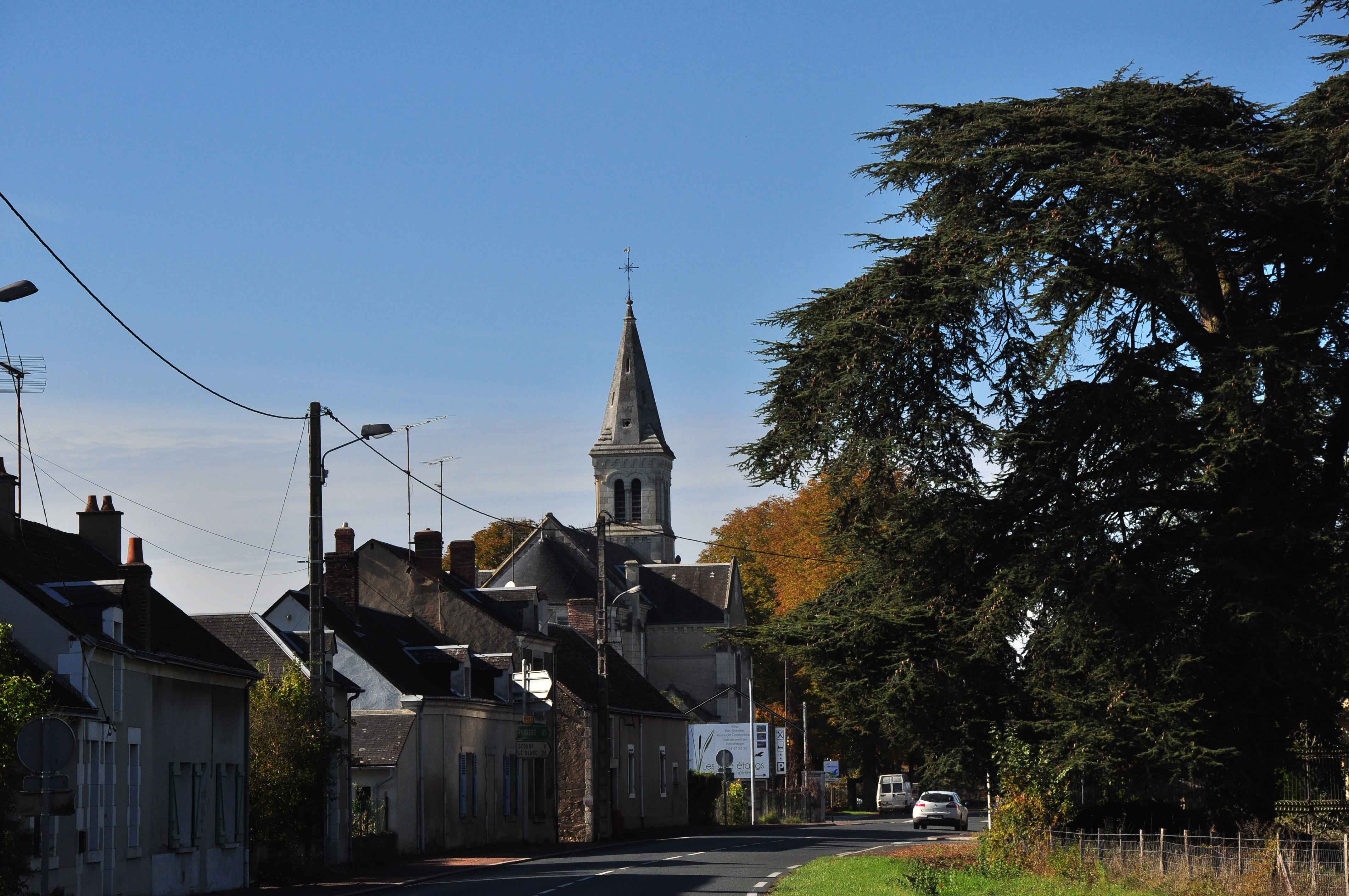 Chitray (Indre)